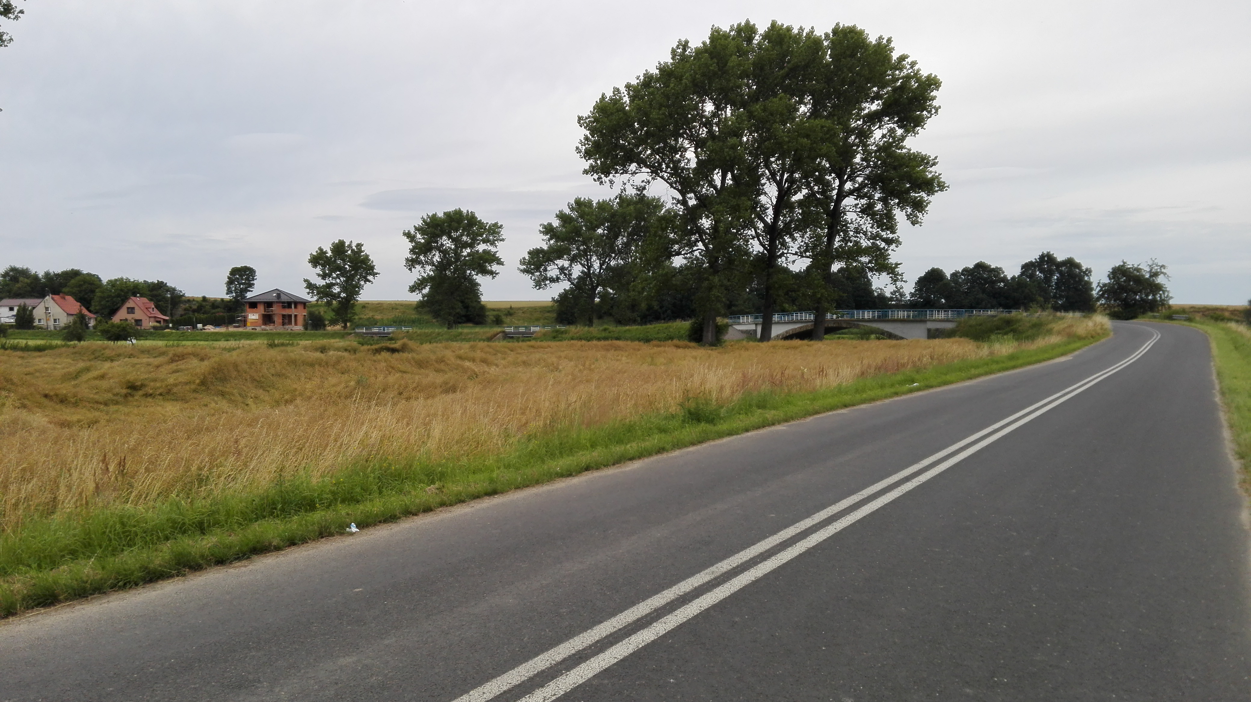 Dytmarów – wieś w Polsce położona w województwie opolskim, w powiecie prudnickim, w gminie Lubrza.